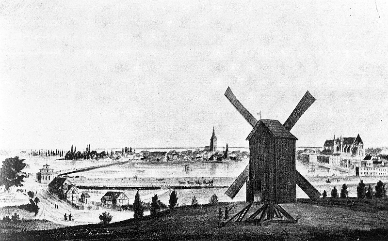 Original image description from the Deutsche FotothekSchwerin. Bockmühle, zur Bischofsmühle gehörig, um 1840, aus: Mecklenburger Jahrbücher, 1932